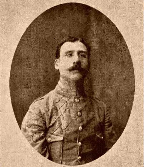 General Eugenio Aguirre Benavides